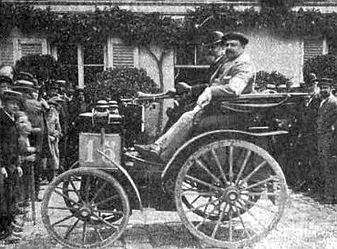 La Panhard & Levassor n°15 d'Émile Levassor en 1894 (Paris-Rouen), Histoire de l'automobile, Pierre Souvestre, éd. H. Dunod et E. Pinat, 1907 (ASIN B001BPBE58) p.279